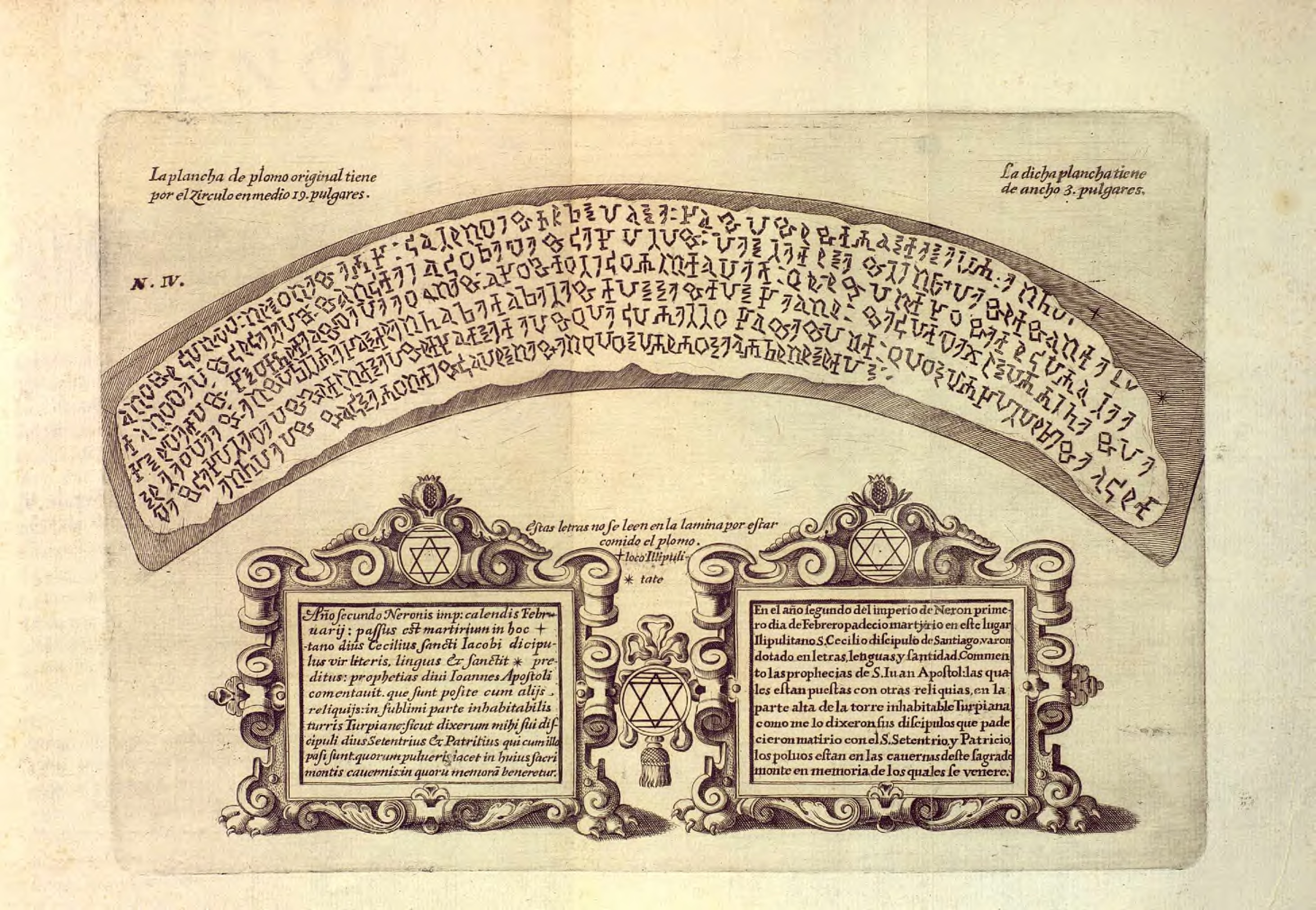 Diego Nicolás Heredia Barnuevo, Mystico ramillete historico, chronologyco, panegyrico, texido de las tres fragrantes flores del nobilissimo antiguo origen, exemplarissima vida, y meritissima fama posthuma del Ambrosio de Granada ... el Illmo. y V.Sr. Don Pedro de Castro, Vaca y Quiñones ... Arzobispo de Granada, y Sevilla, y Fundador Magnifico de la Insigne Iglesia Colegial del Sacro Monte Illipulitano. Impreso en Granada en la Imprenta Real, 1741. Grabados a buril sobre cobre en su mayor parte de Francisco Heylan sobre dibujos de Lucenti aprovechando las planchas creadas para la Historia eclesiástica de Granada de Justino Antolínez que quedó sin publicar. Ejemplar digitalizado de la Universidad de Granada